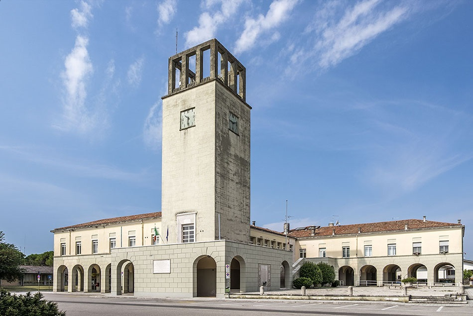 Completato nel 1941